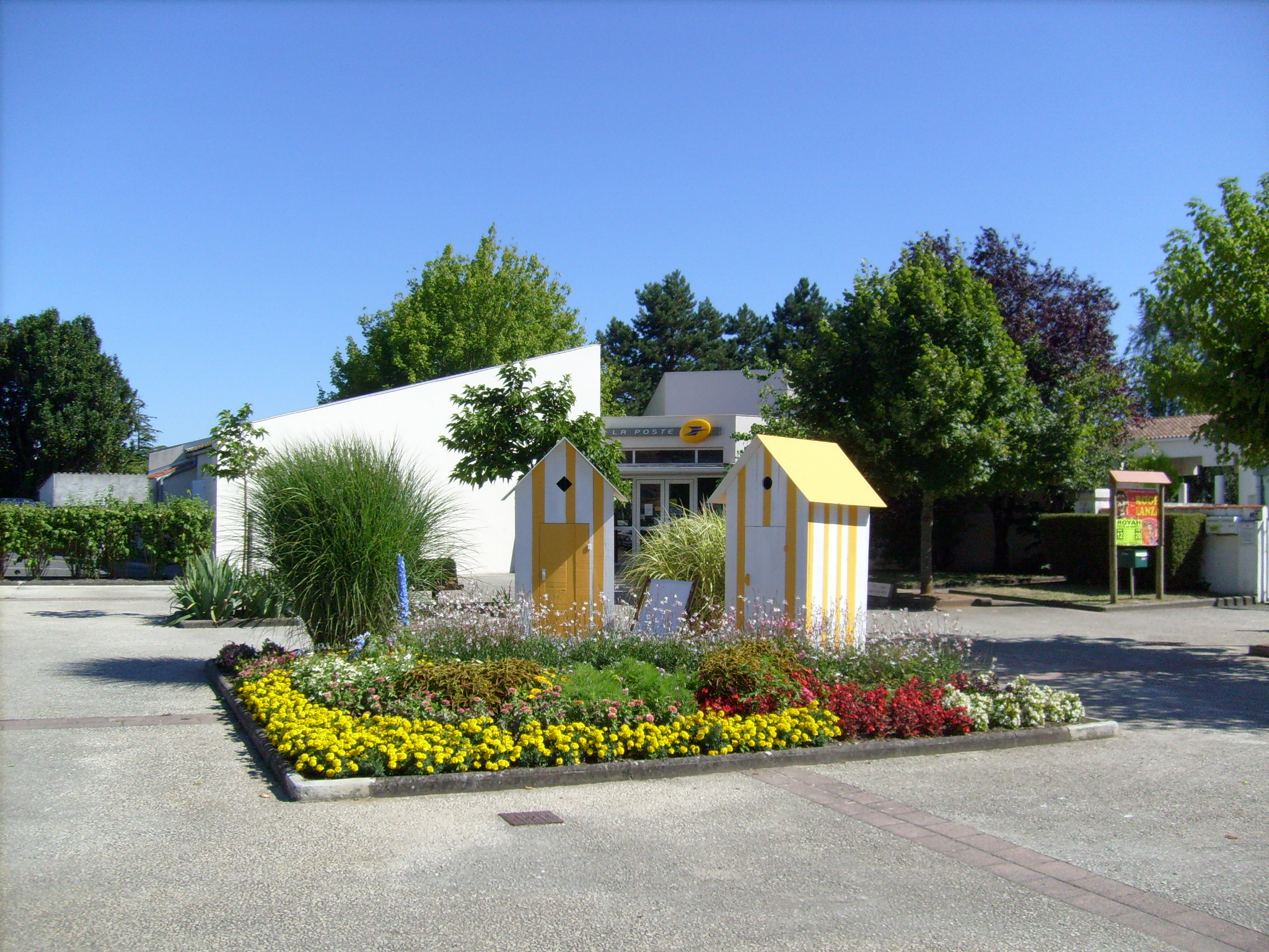 La poste de Breuillet